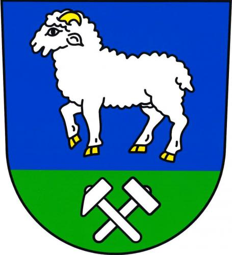 znak, ,Kratochvilka okres Brno-venkov